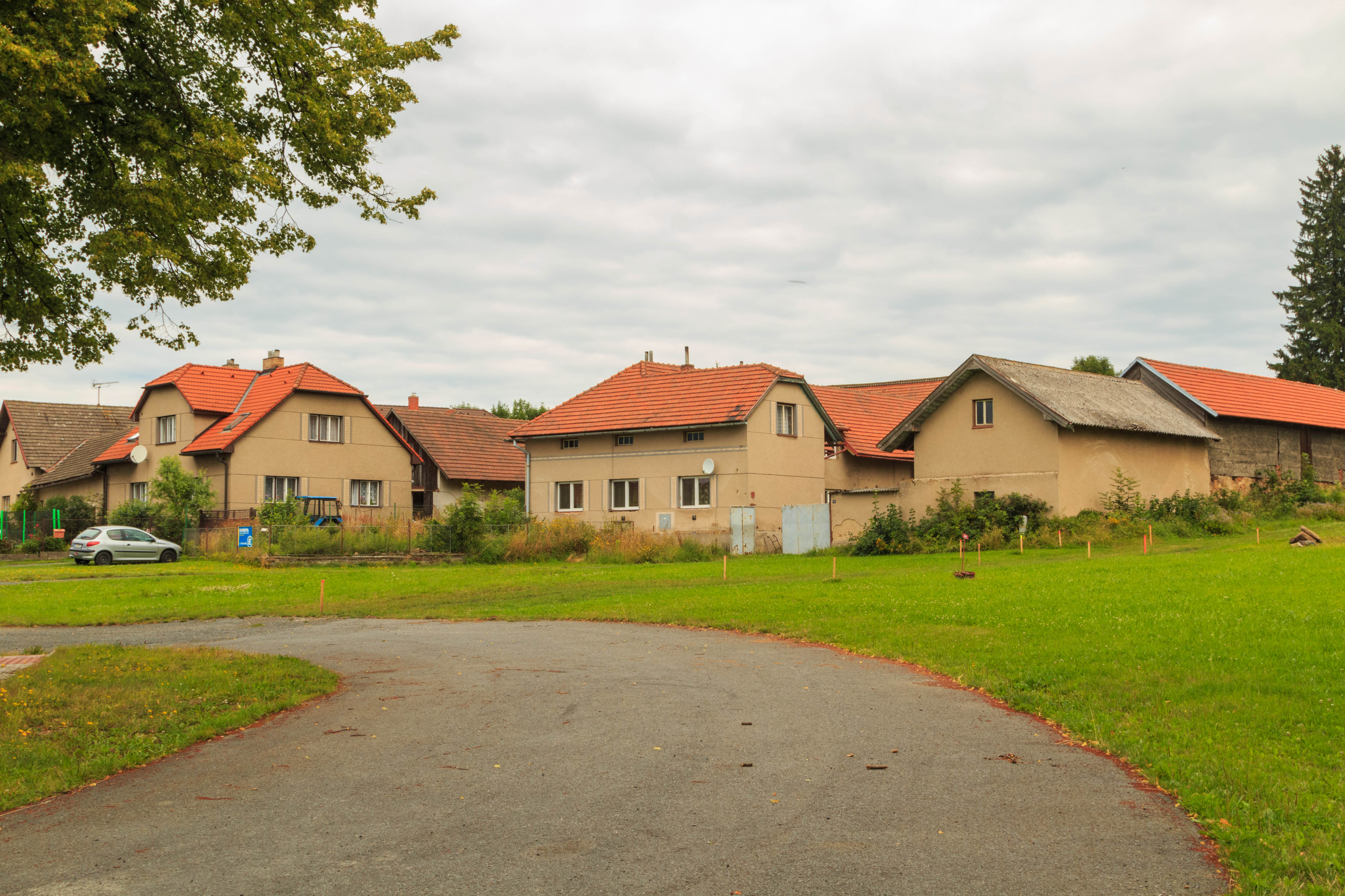 Veselá u Sedletína čp. 16